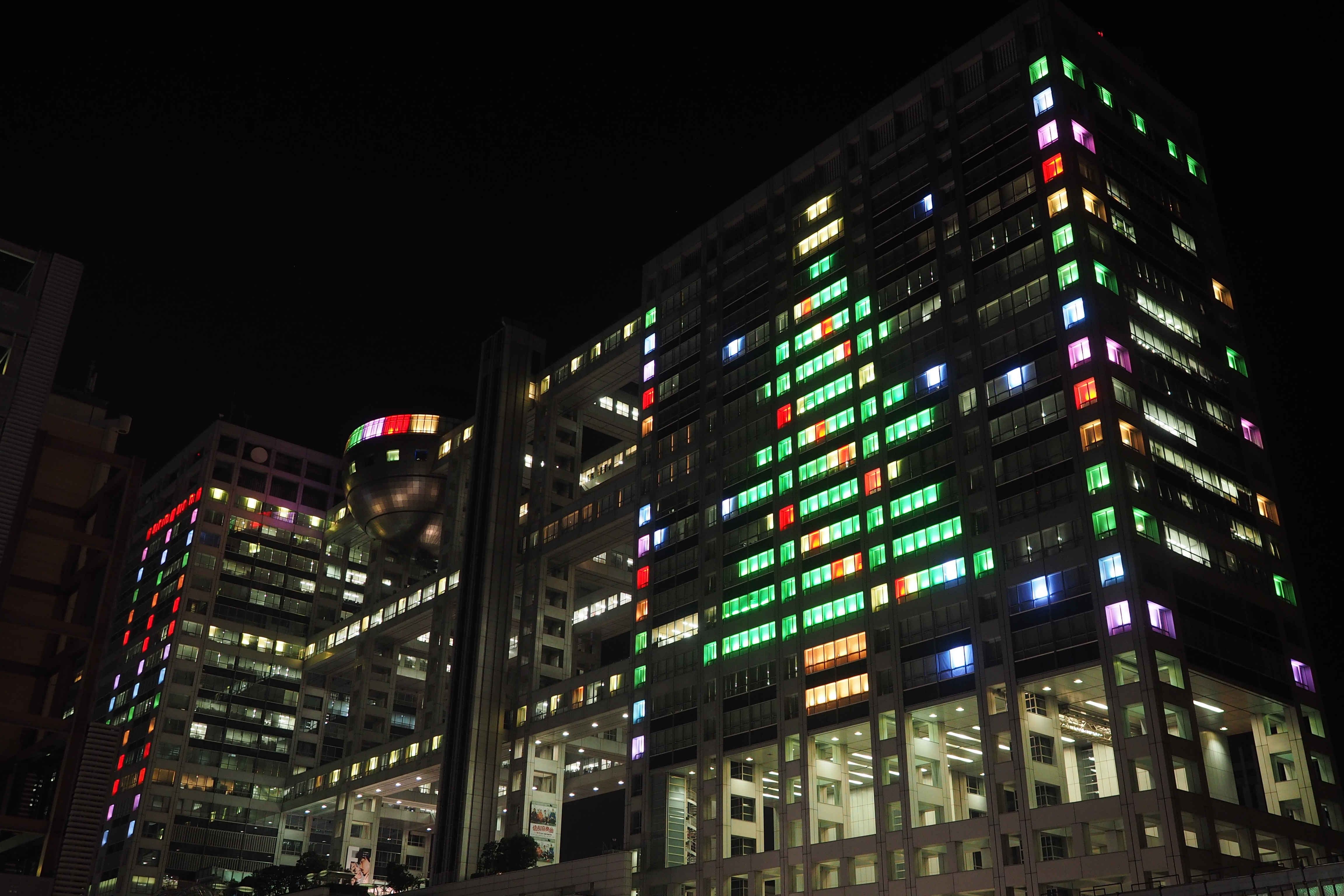 富士電視台 illumination